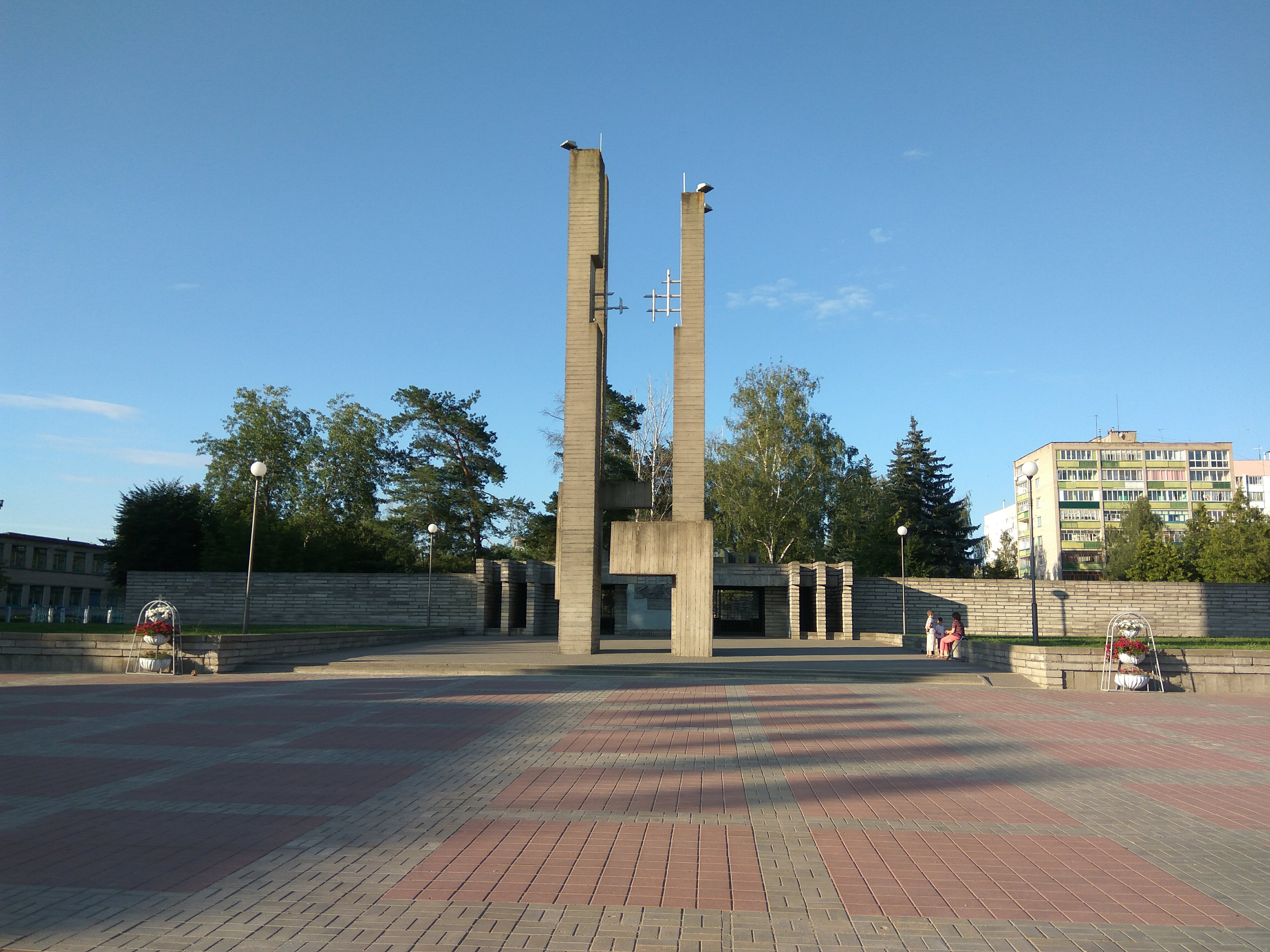 Магілёў. Мемарыяльны комплекс на месцы Лупалаўскага лагера